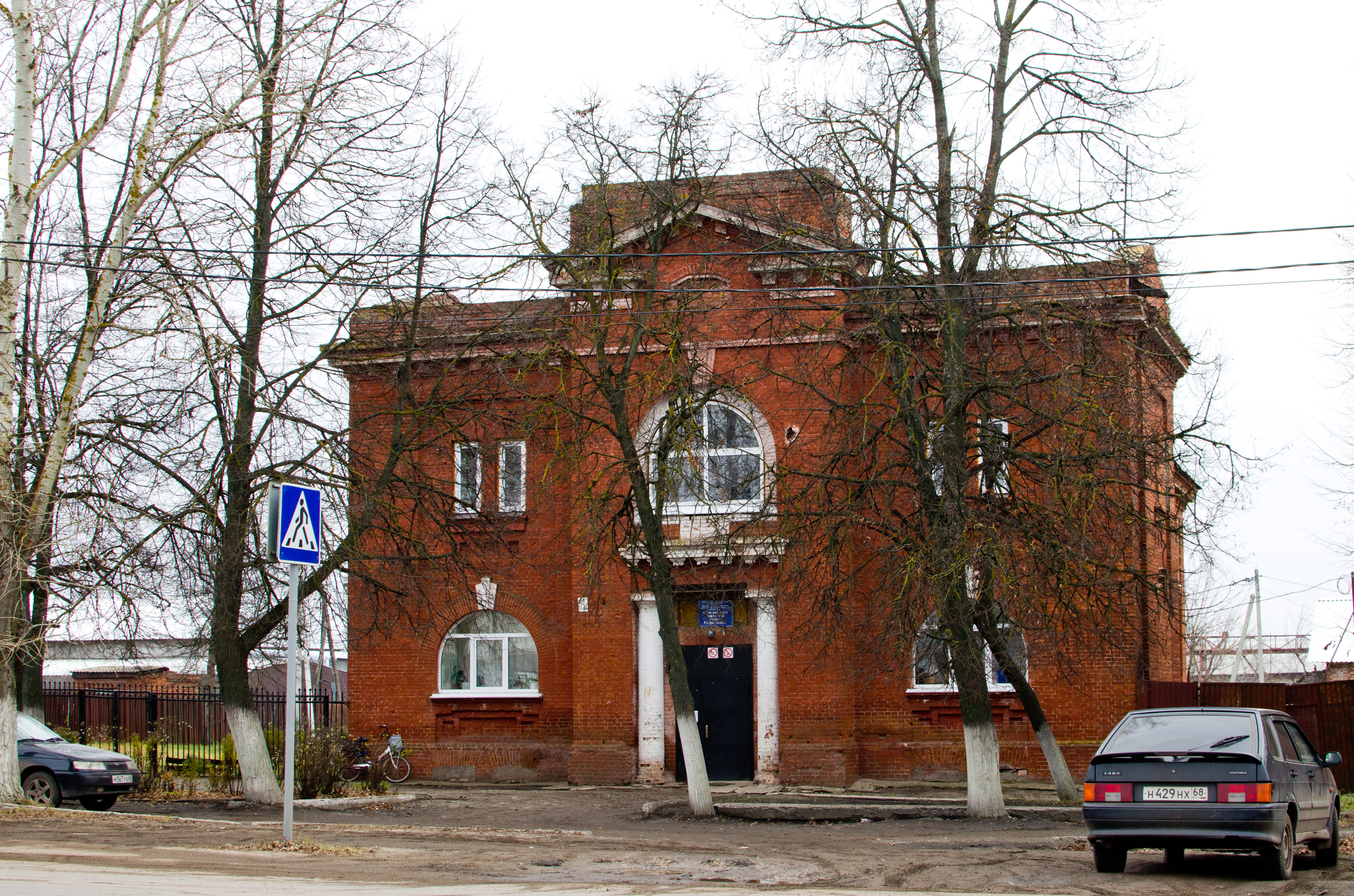 Молельный дом молокан: улица Комсомольская, 115А, Рассказово, Тамбовская область